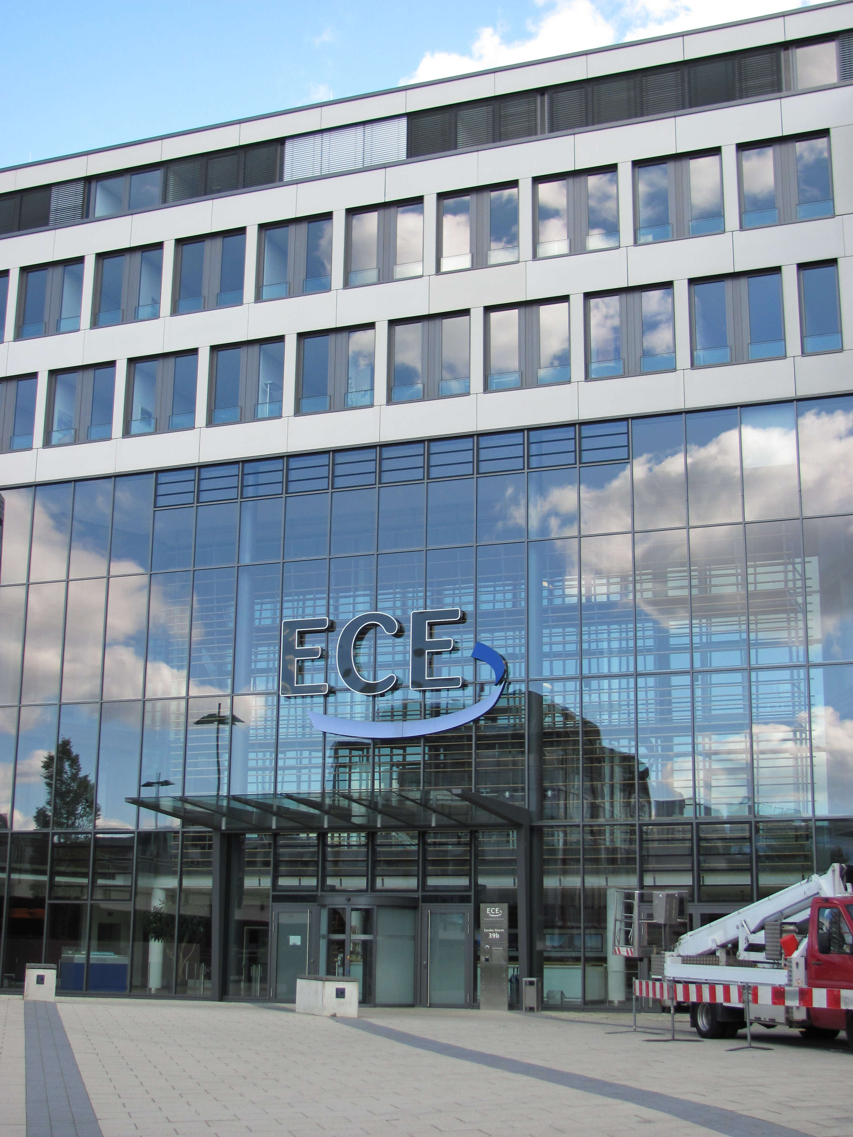 Sitz der ECE Projektmanagement am Alstertal-Einkaufszentrum in Hamburg-Poppenbüttel